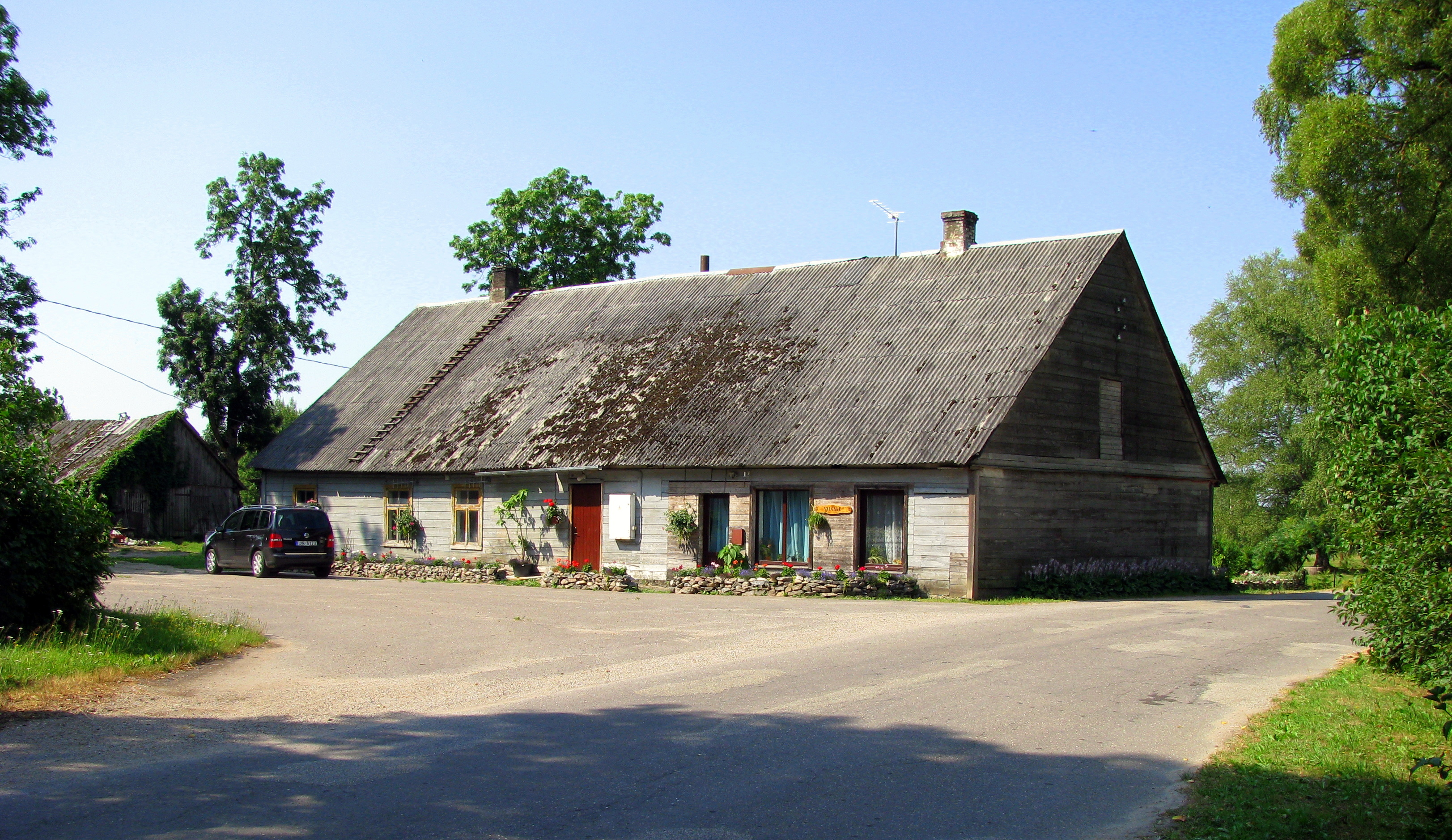 Building close to Valgale manor. Valgales muižas ēka. Augusts, 2014